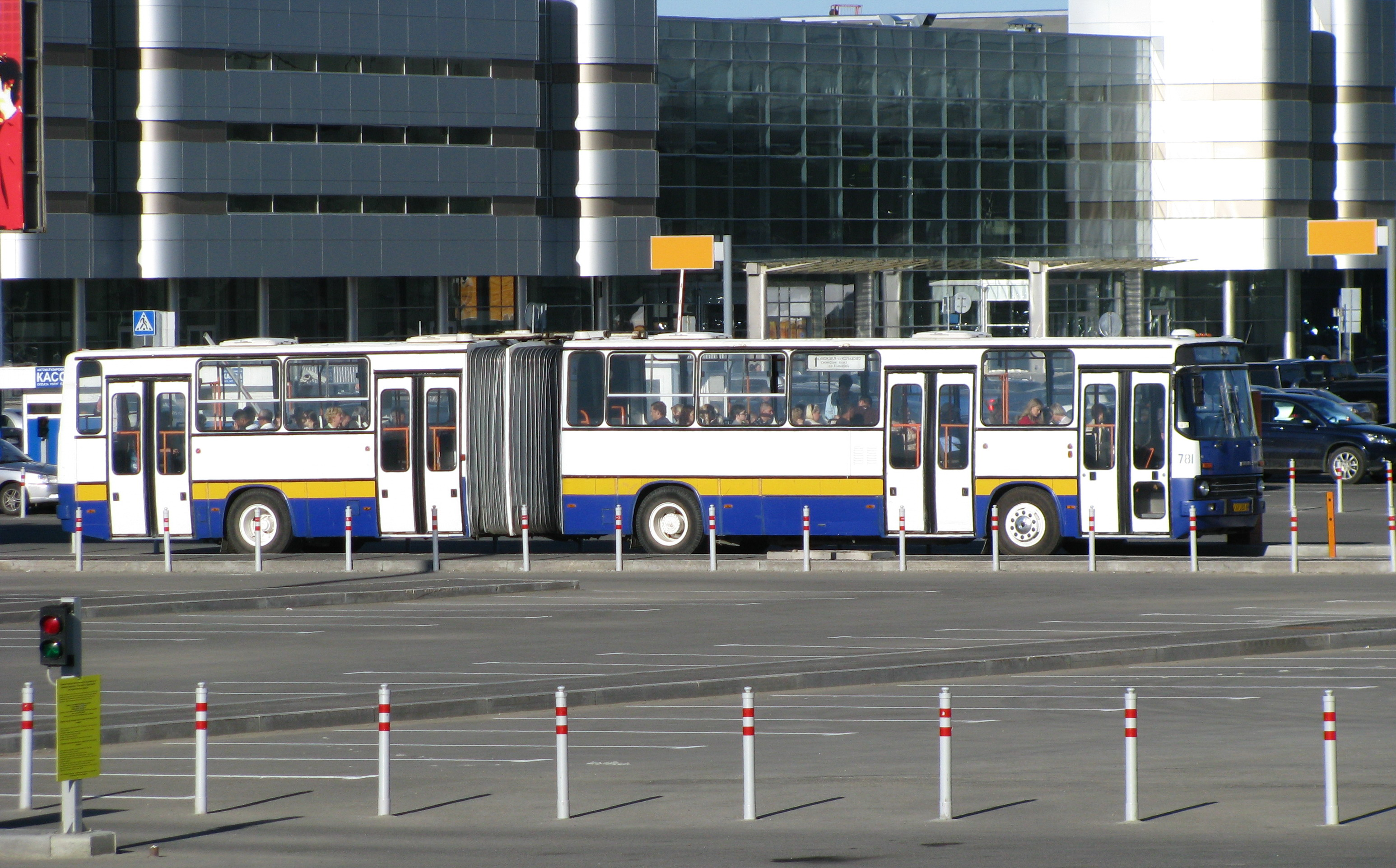 Икарус-283 - основа автобусного парка Екатеринбурга (всего в МОАП Екатеринбурга насчитывается 168 таких автобусов, закупленных в 1997 году)